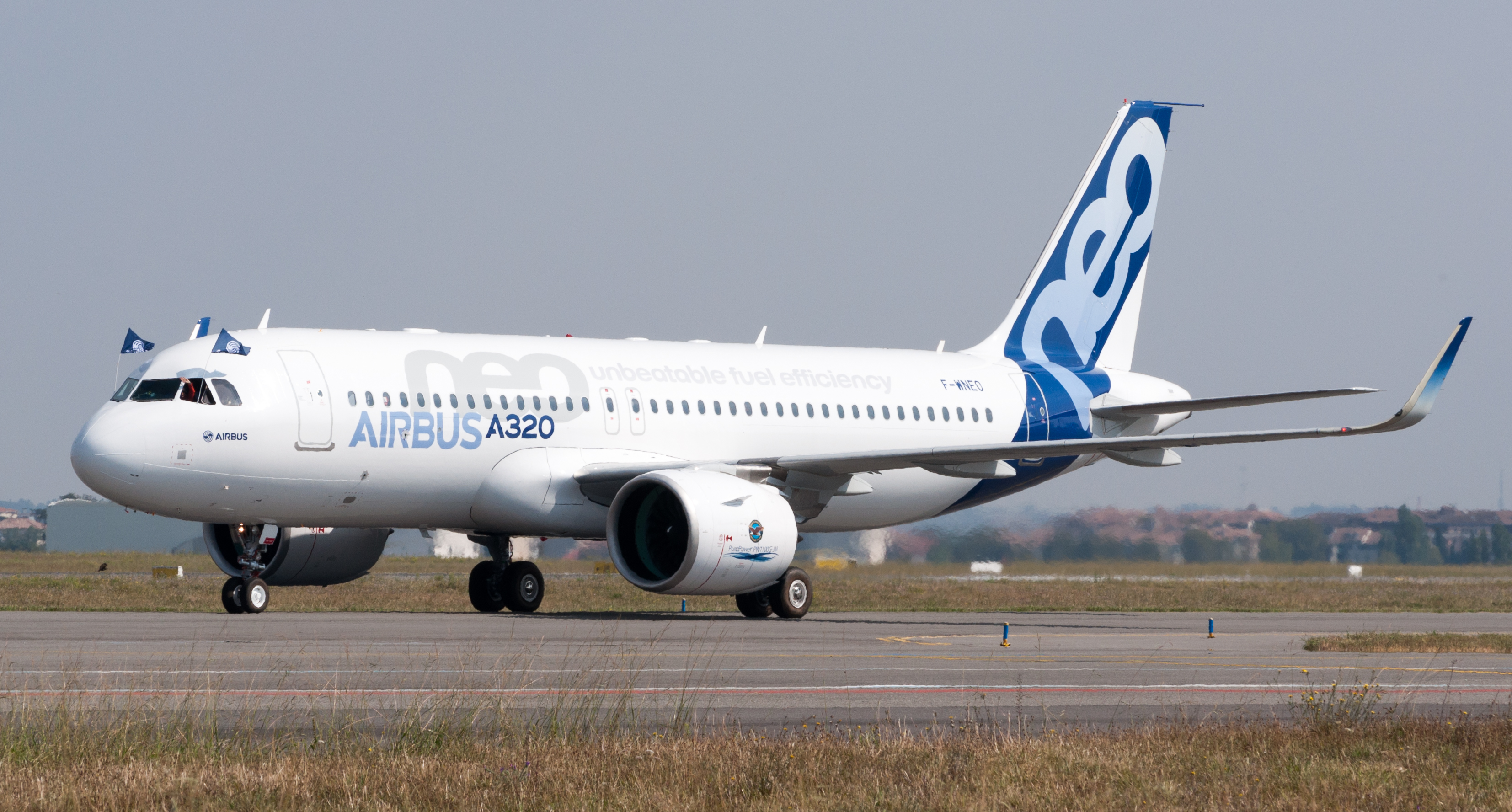 Atterrissage de l'A320neo après son premier vol